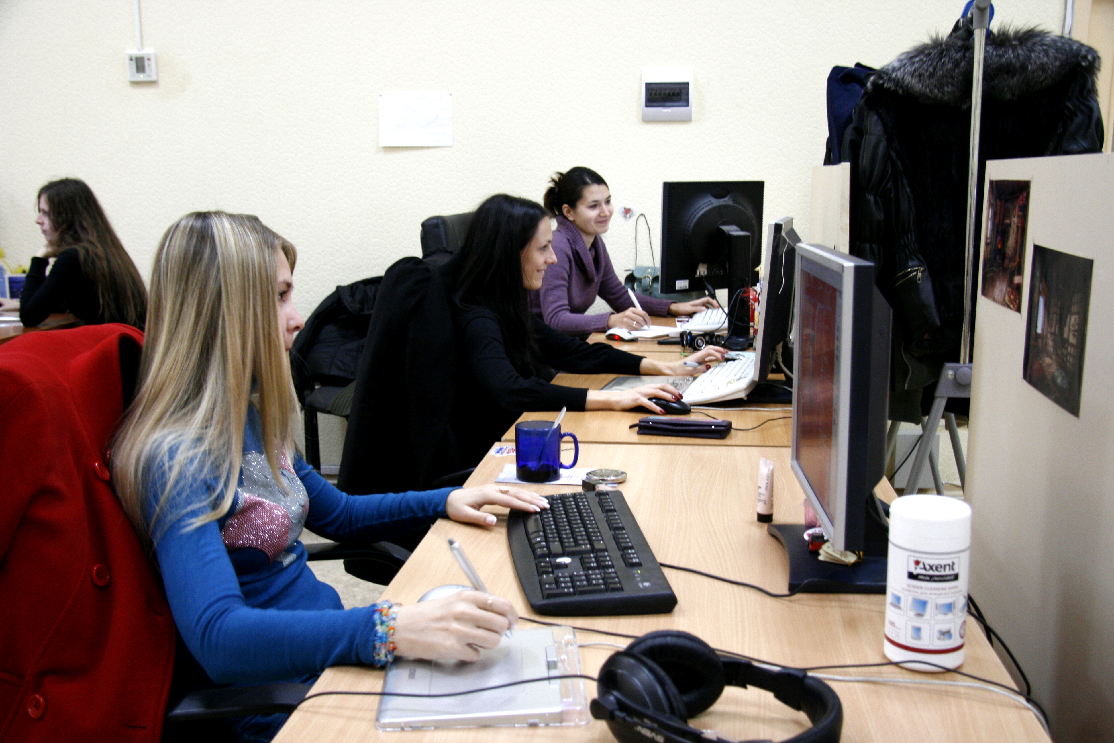 Photo prise dans le studio de Frogwares à Kiev.